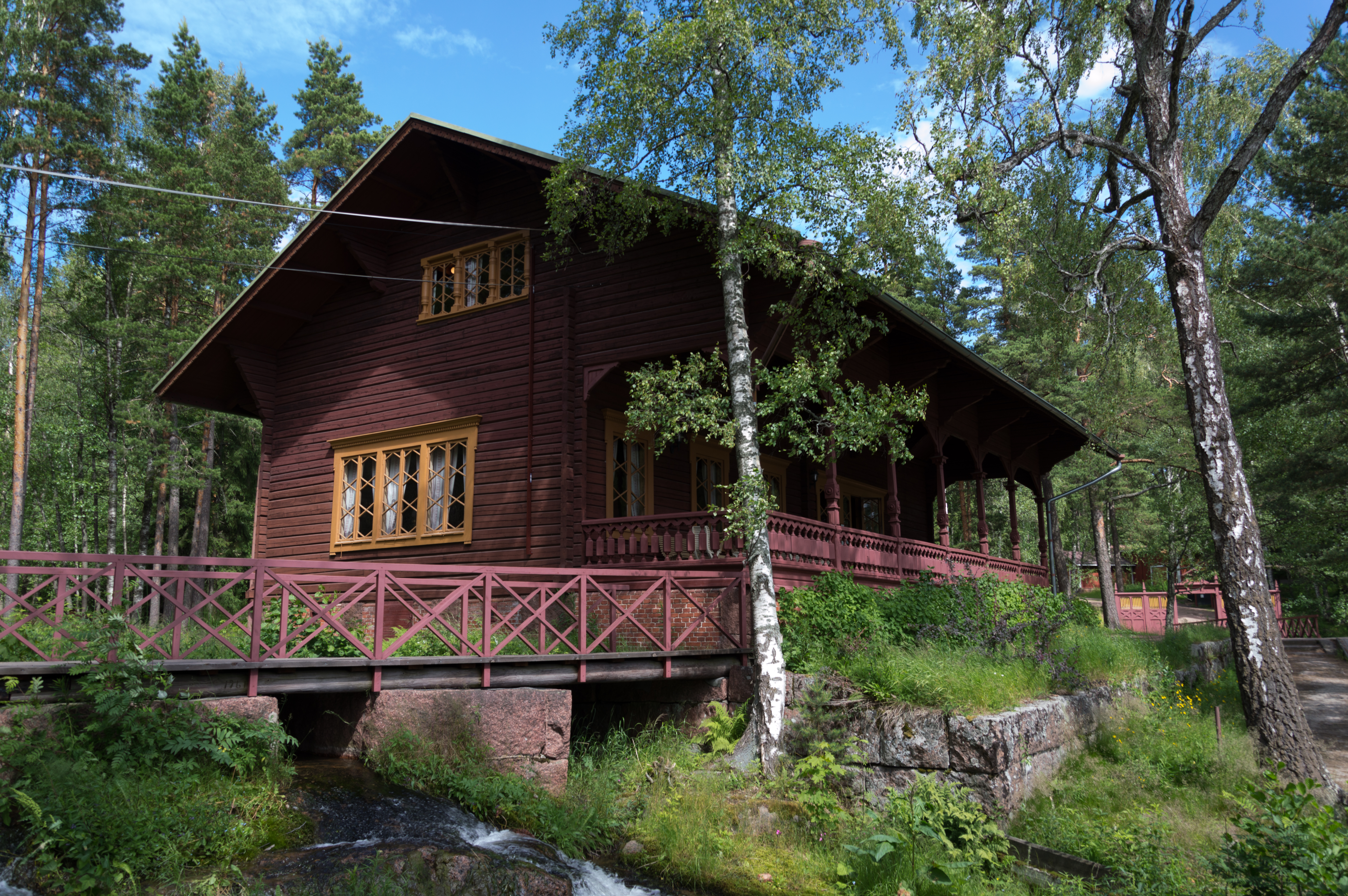 Langinkosken historiallinen kalastusmaja